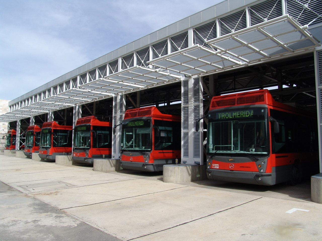 Patio de talleres del sistema Trolmerida.